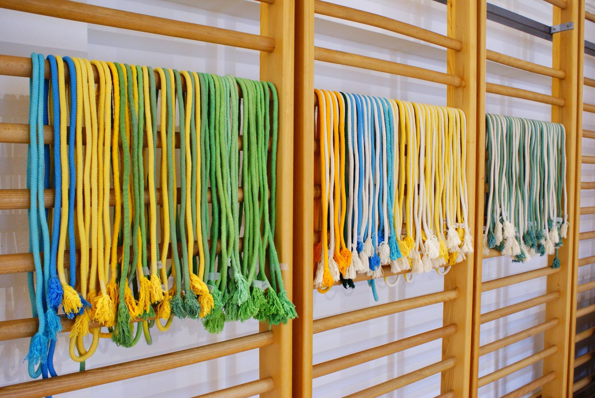 Društvo Capoeira Slovenija uporablja sistem pasov Nacao Capoeira